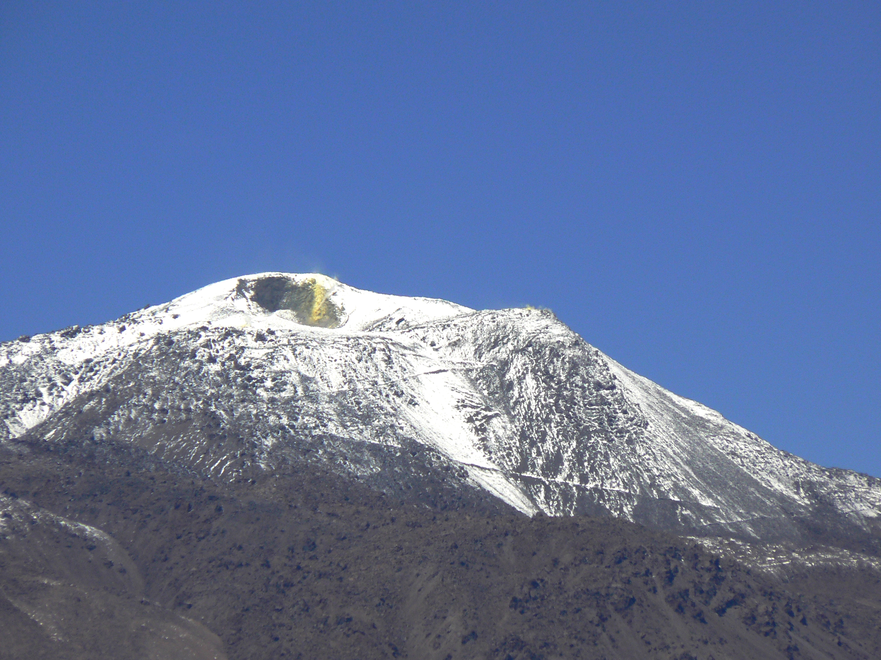 Stratovolcan Putana (ou Jorgencal) 5890 m, situé à la Frontière Chilo - Bolivienne, (photo prise du coté chilien) Région II, province d'El Loa, Chili; On voit nettement des dépots de soufre dans la gueule du cratère. La neige rend bien visible le chemin qui mène au sommet